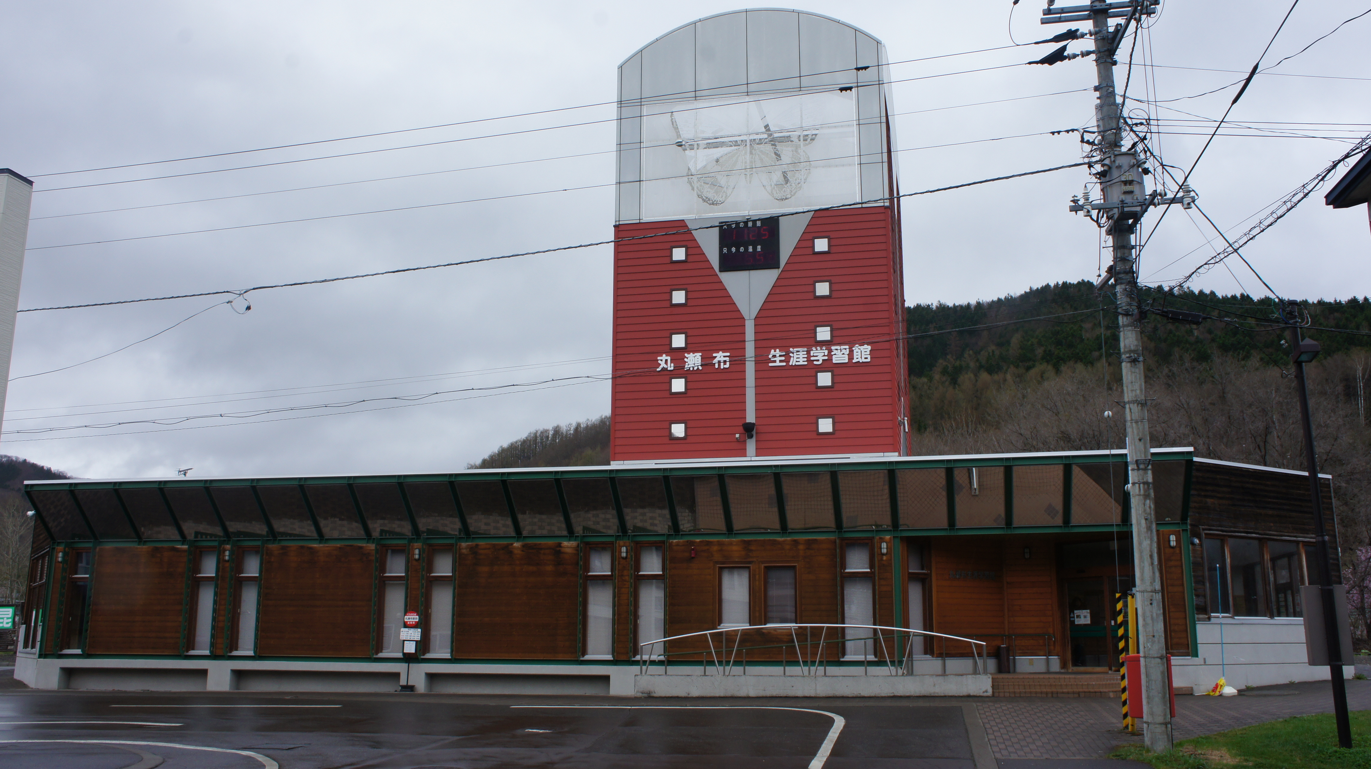 JR石北本線・丸瀬布駅の駅舎